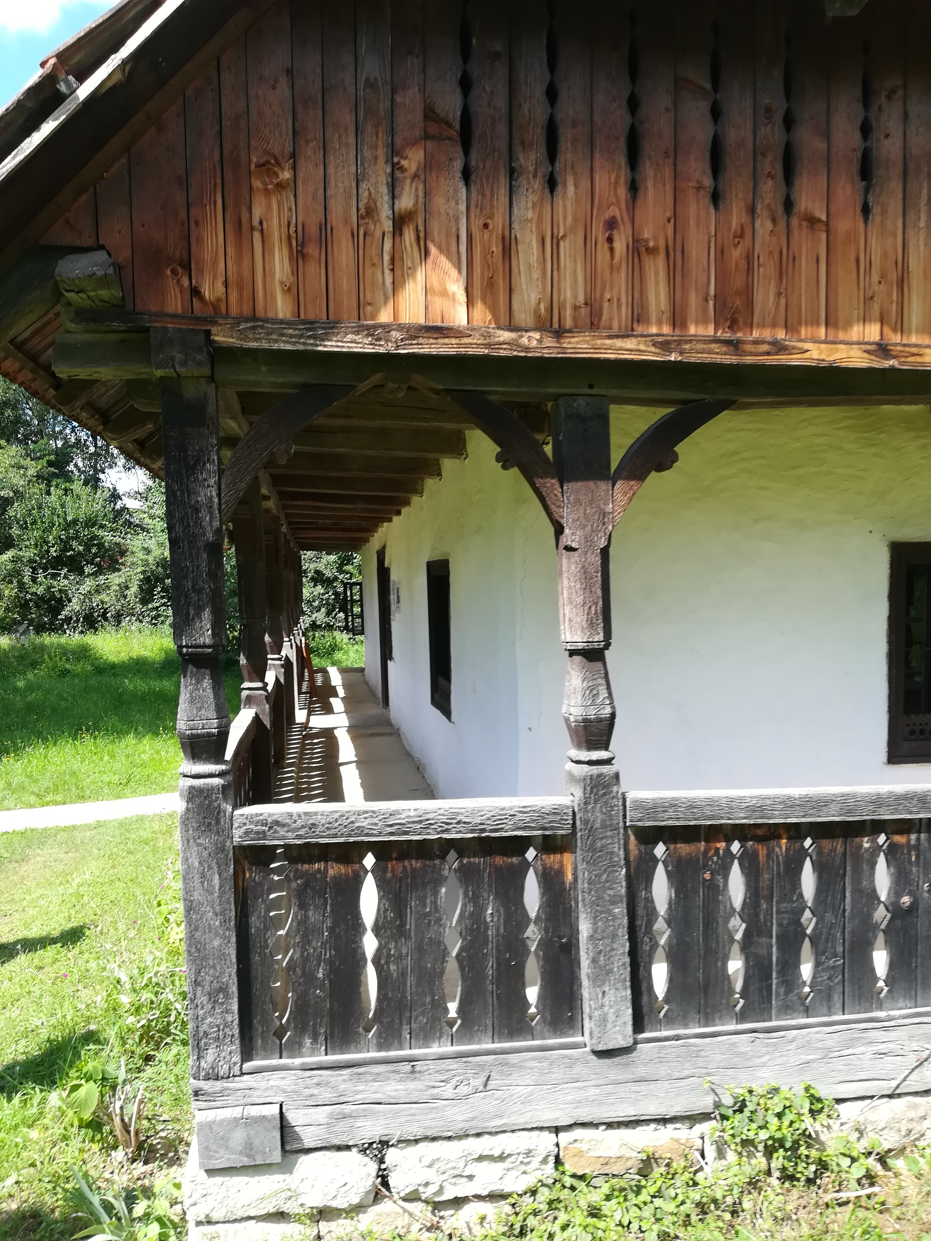 Muzeul Etnografic al Țării Oașului (secția în aer liber)